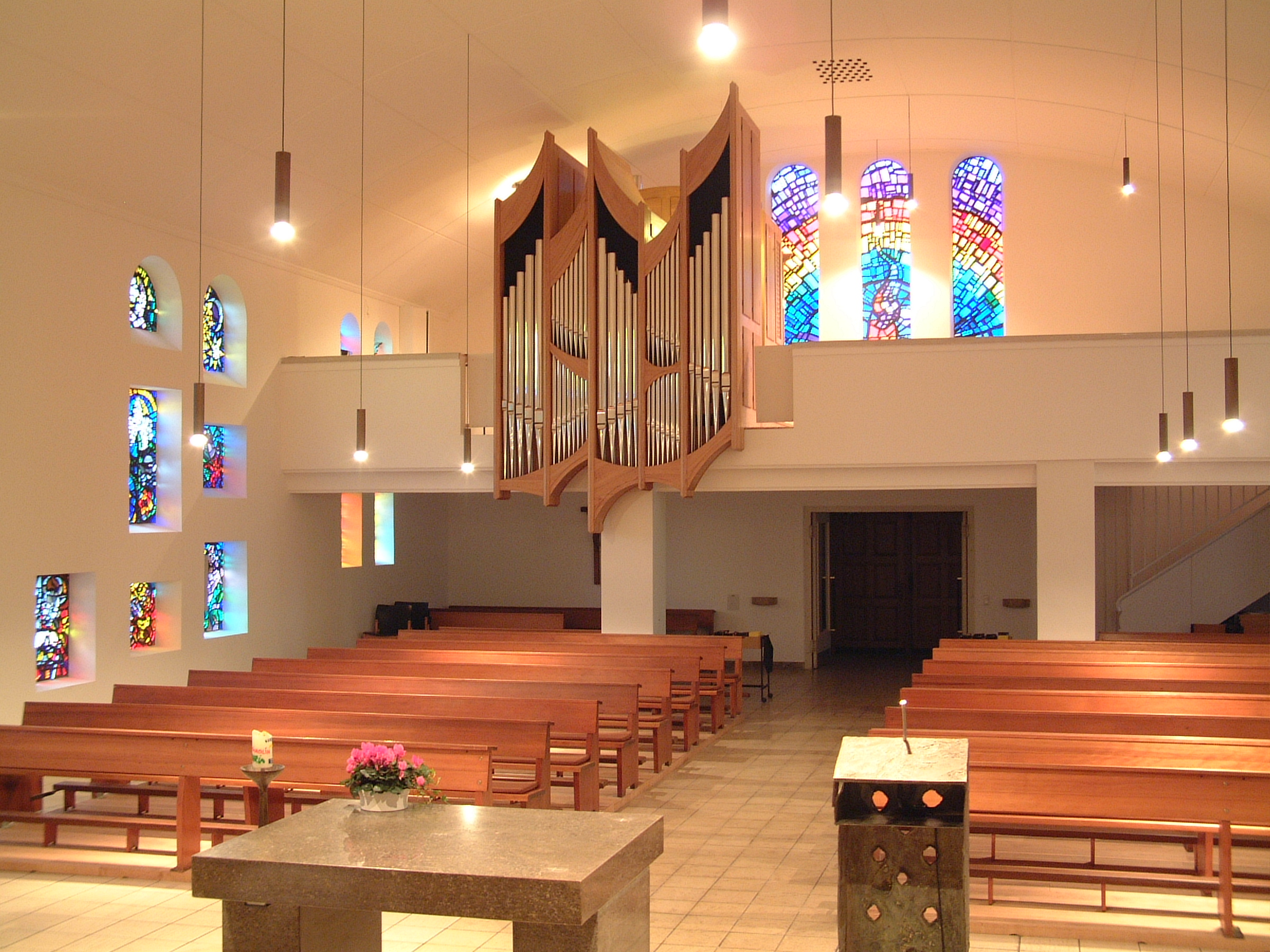 St. Marien Pesch: Ansicht der Seifert-Orgel vom Altar (Foto: Seifert 2003)